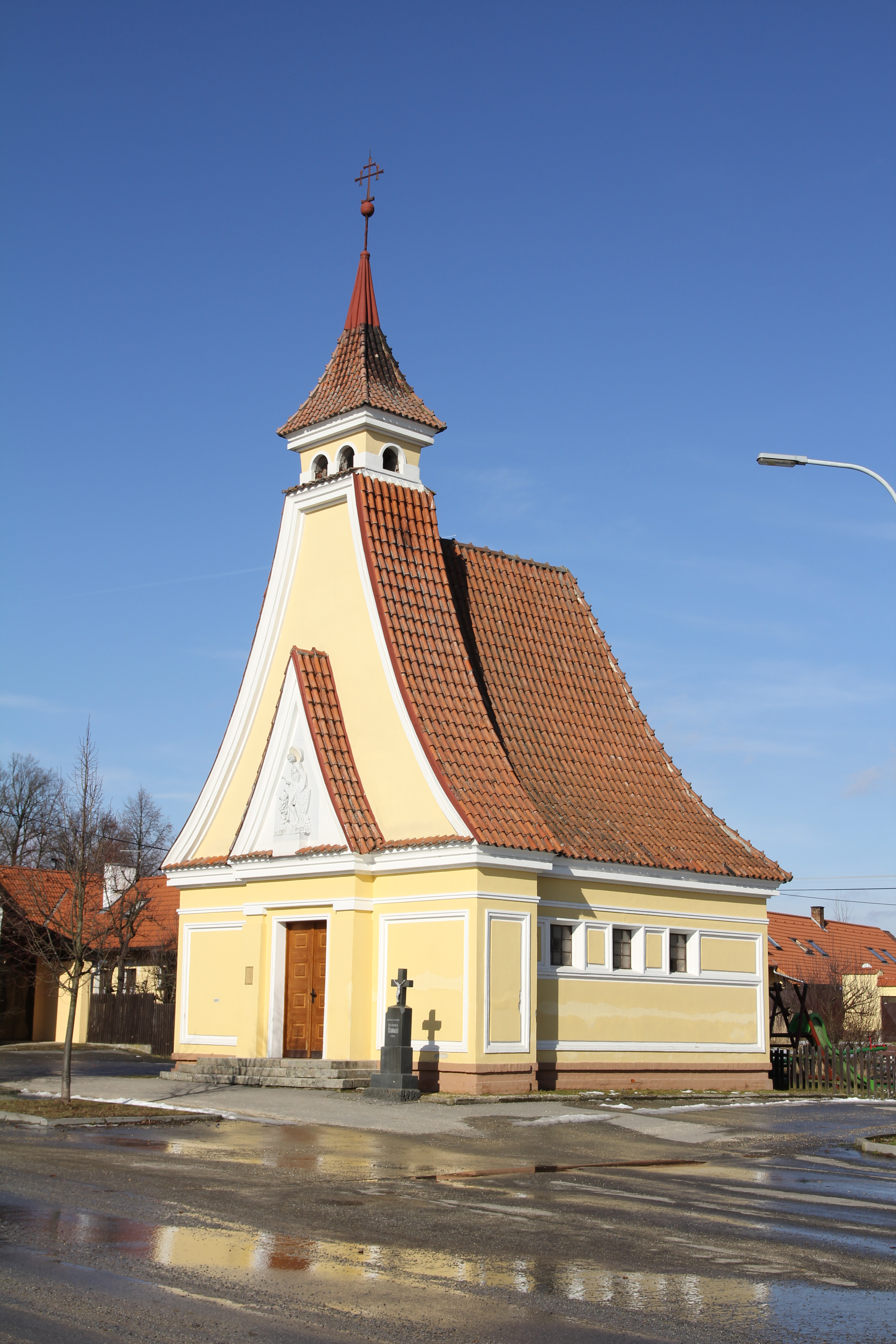 Kaple svatého Václava v Domaníně, okres Jindřichův Hradec